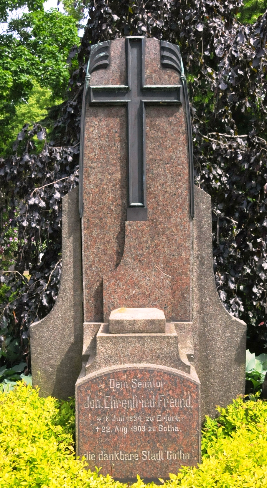 Grabstätte von Joh. Ehrenfried Freund auf dem Hauptfriedhof Gotha